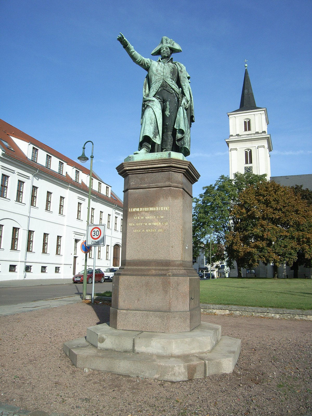 Dessau,Denkmal von Leopold III. Friedrich Franz (Anhalt-Dessau) von Bilhauer August Kiss